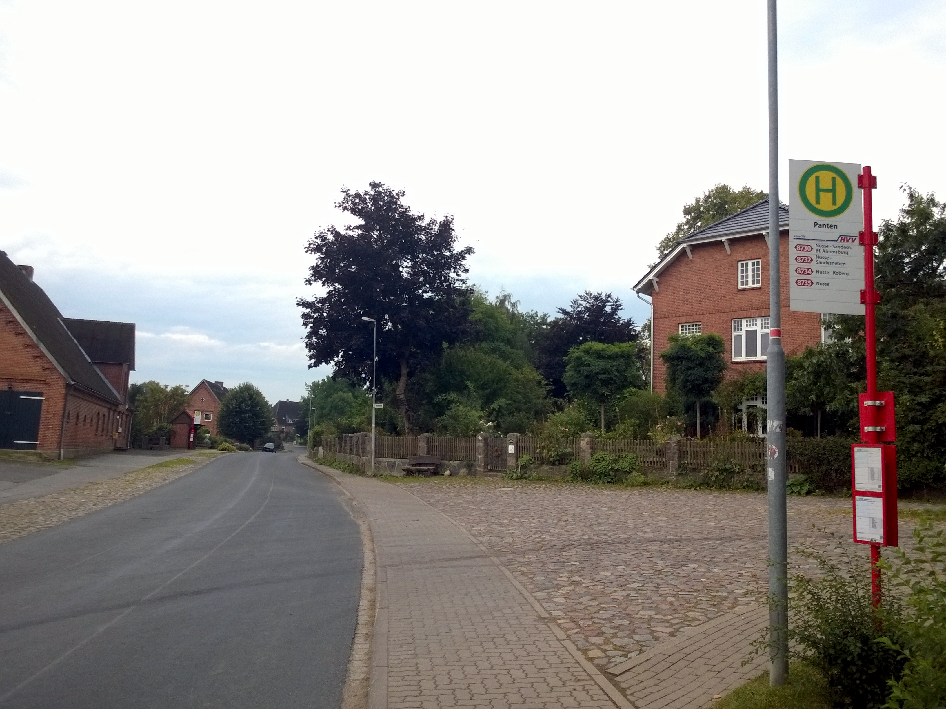 Panten, Bushaltestelle